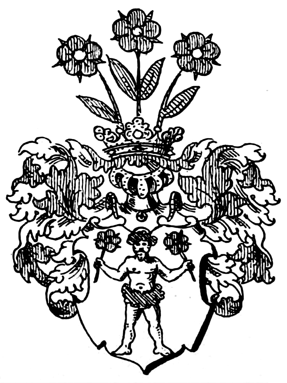 Stammwappen derer von Schoultz